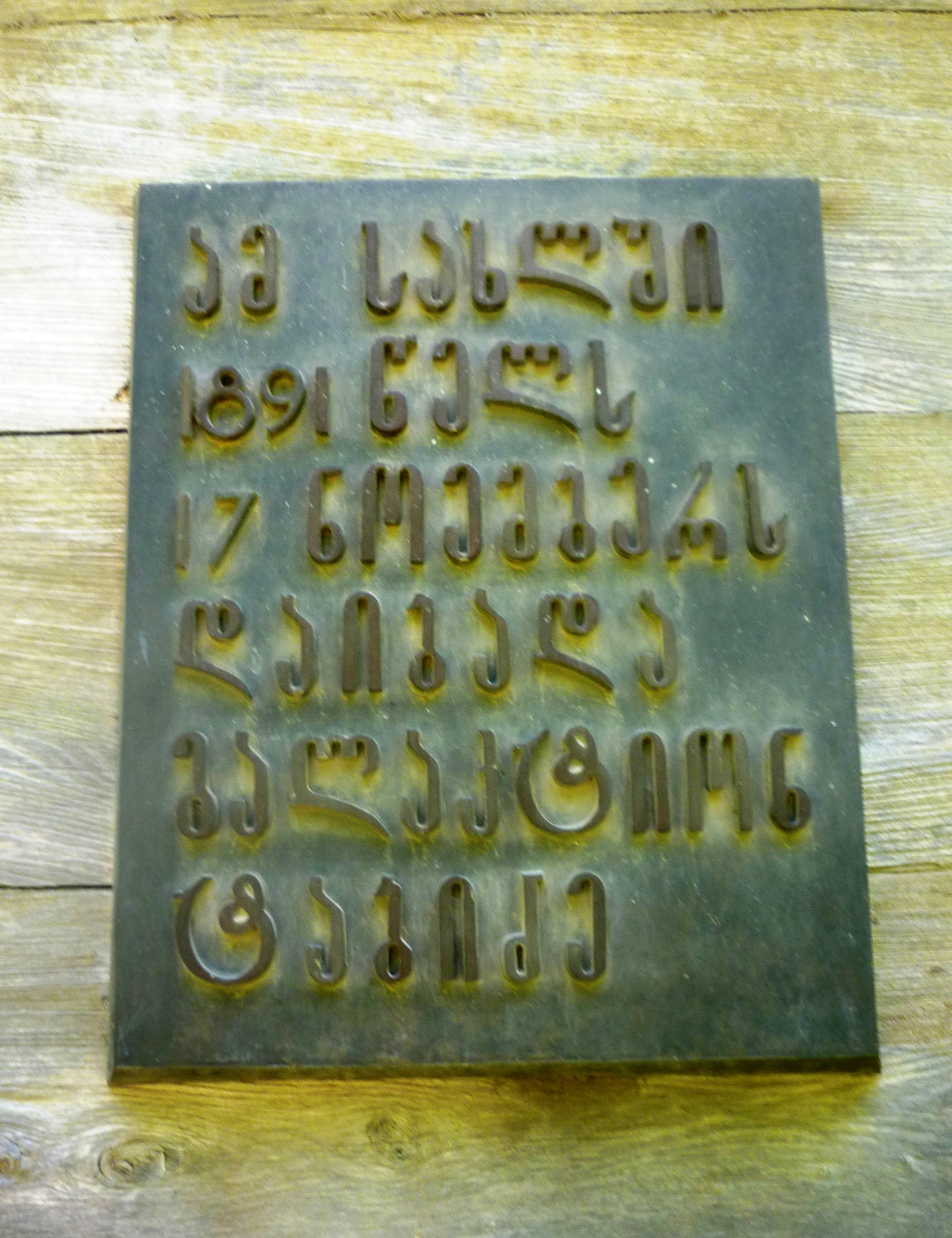 გალაკტიონ ტაბიძის მემორიალური დაფა